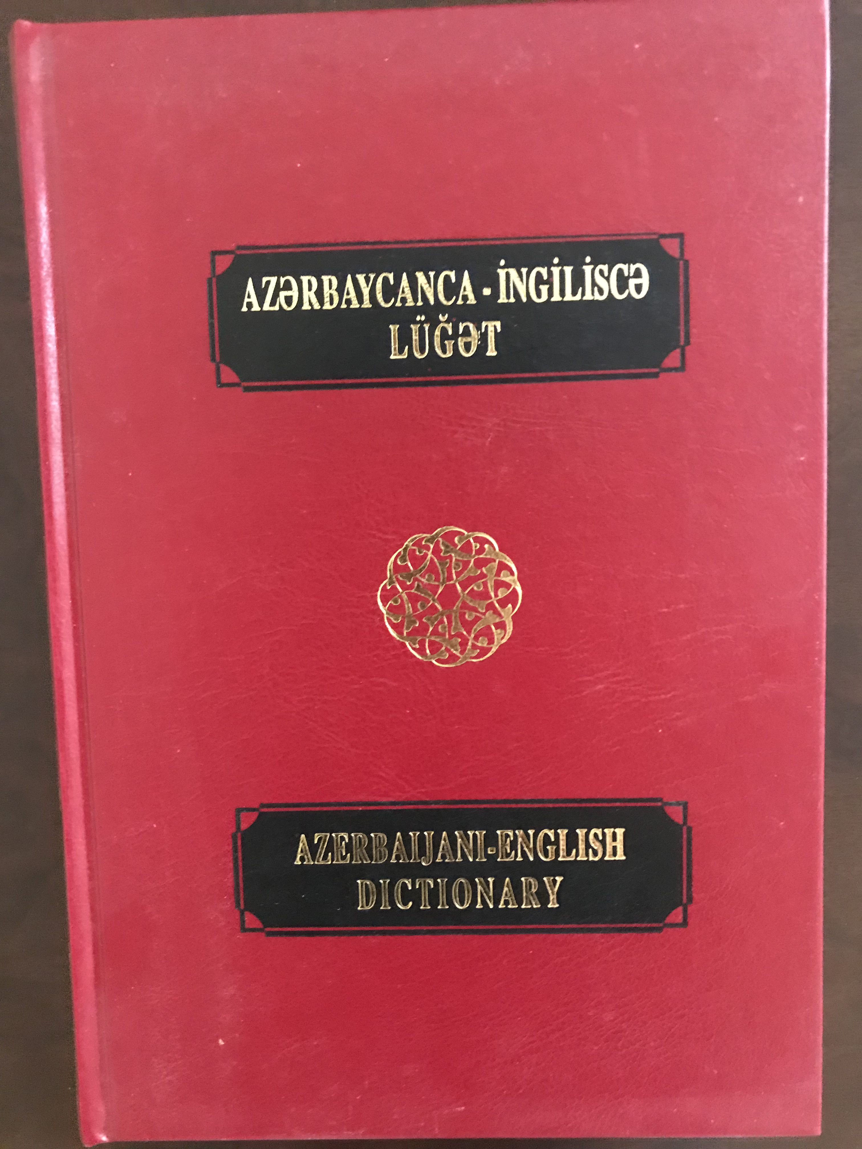 Azərbaycanca-İngiliscə Lüğət. Bakı - 1998